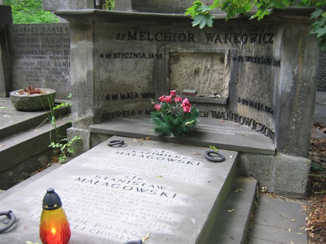 Melchior Wańkowicz's monument (Powązki Cemetery; Cmentarz Komunalny, d. Wojskowy)